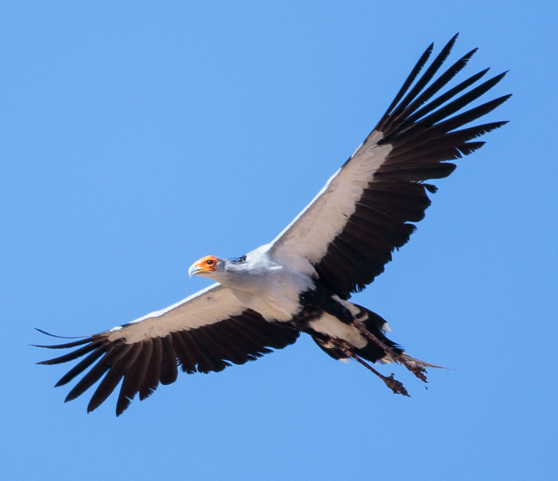 1M2A4891.jpg